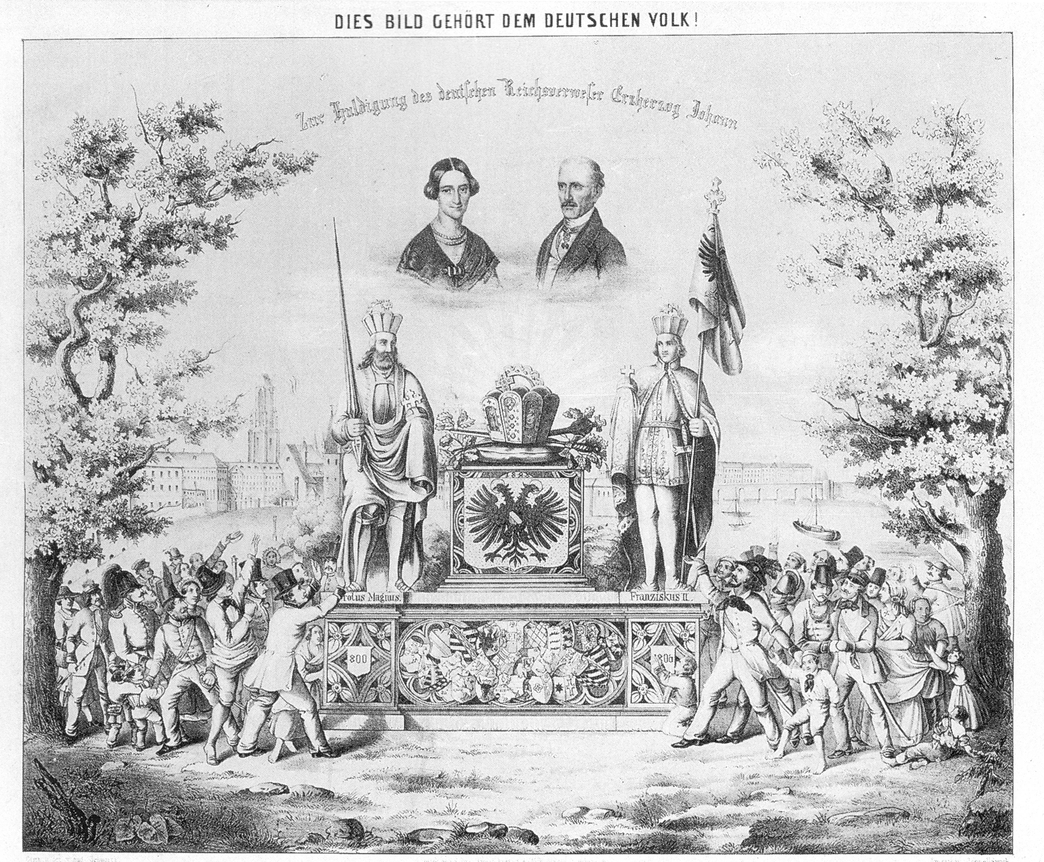 Lithographie von Eugen Schwartz. “Dies Bild gehört dem deutschen Volk! Zur Huldigung des deutschen Reichsverwesers Johann”.